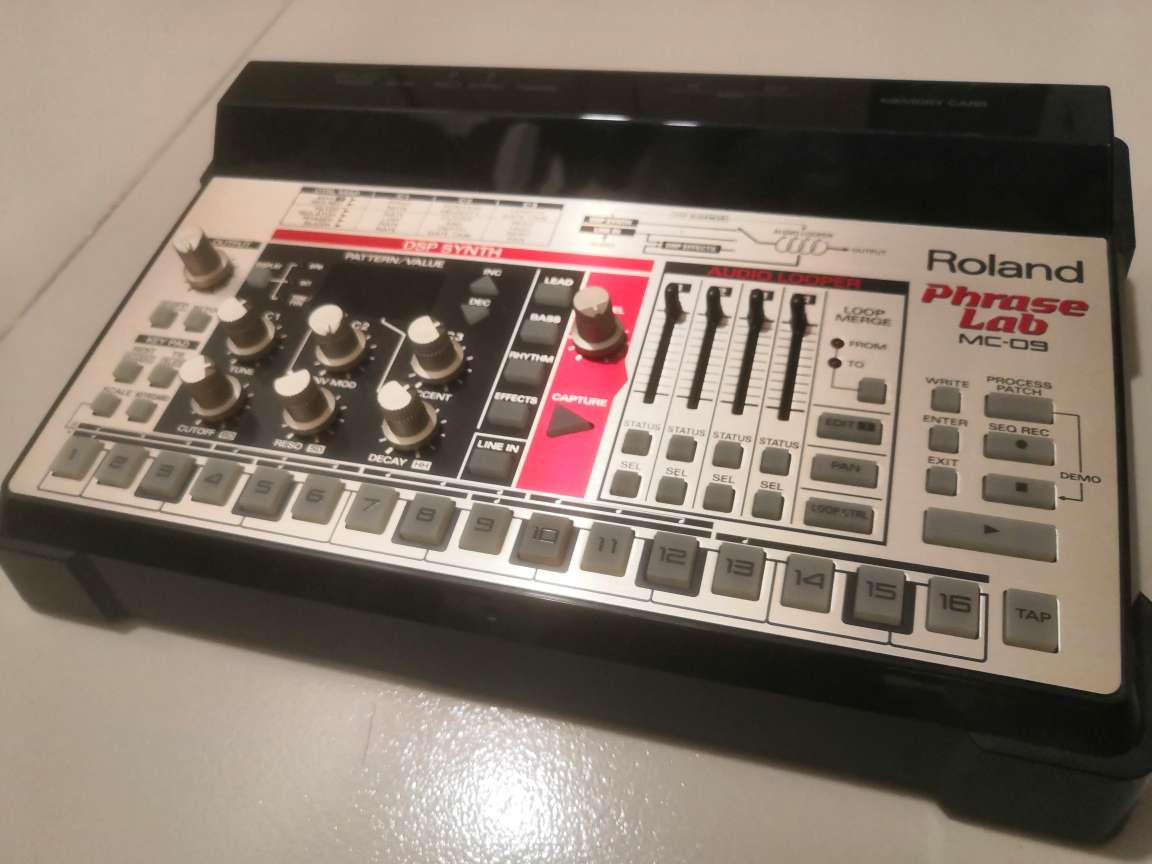 外観